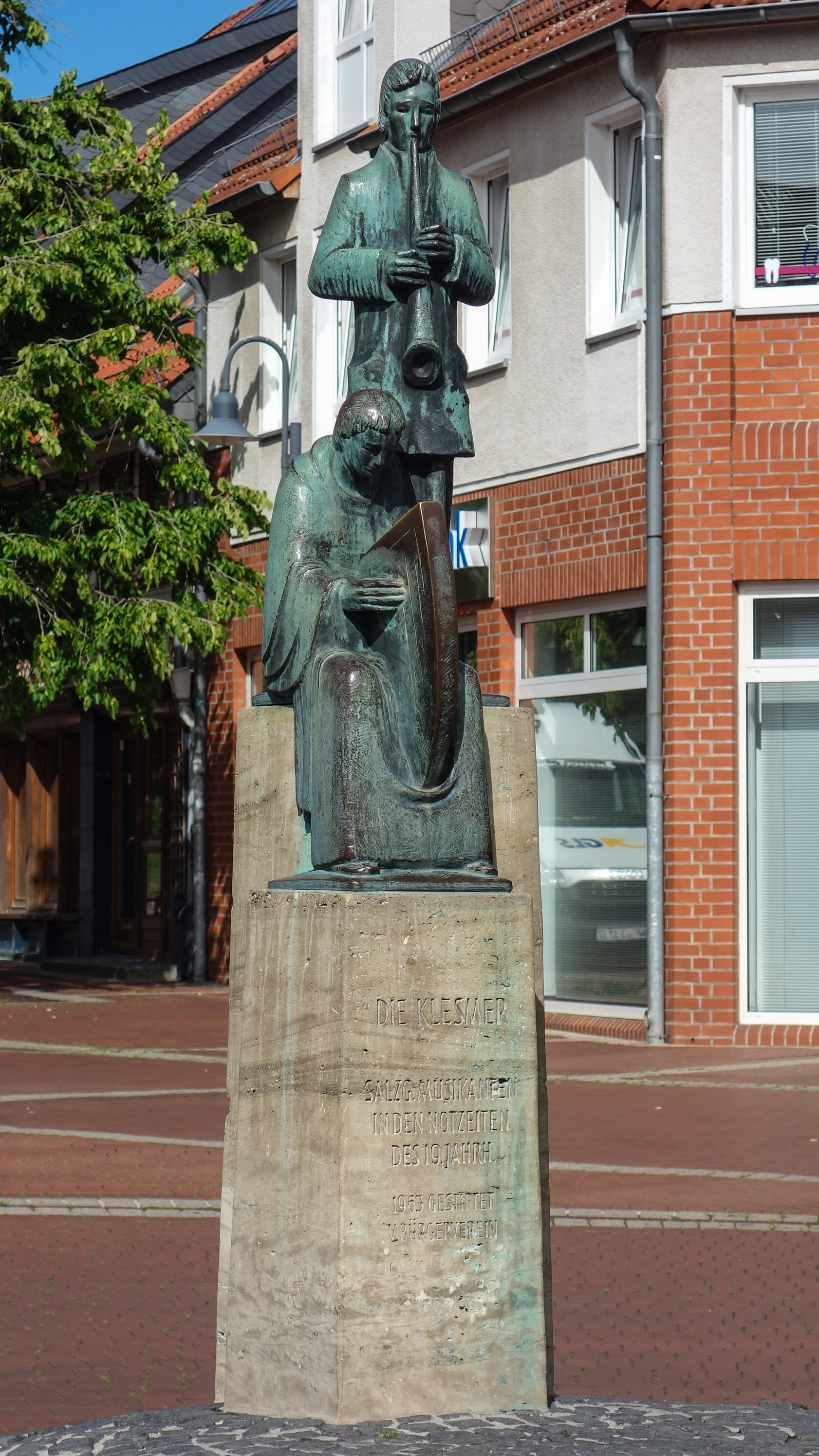 Klesmer-Denkmal - Stadt- und Wandermusikanten des 19. Jahrhunderts - Statue der Klesmer